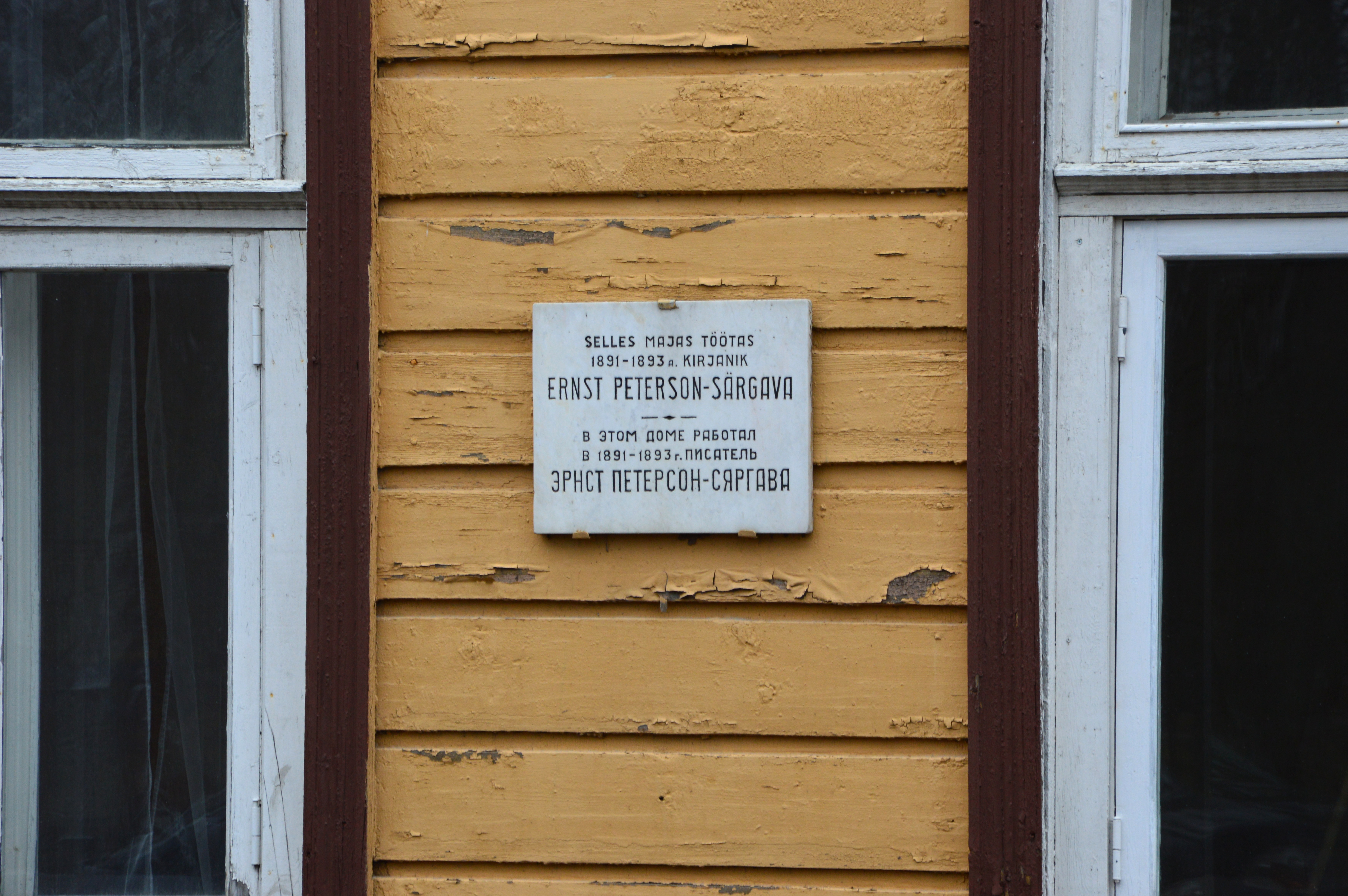 Mälestustahvel endise Sindi ministeeriumikooli hoone seinal.